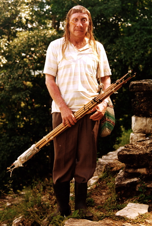 Bonampak, Chiapas, México. Guia Lacandon Maya.